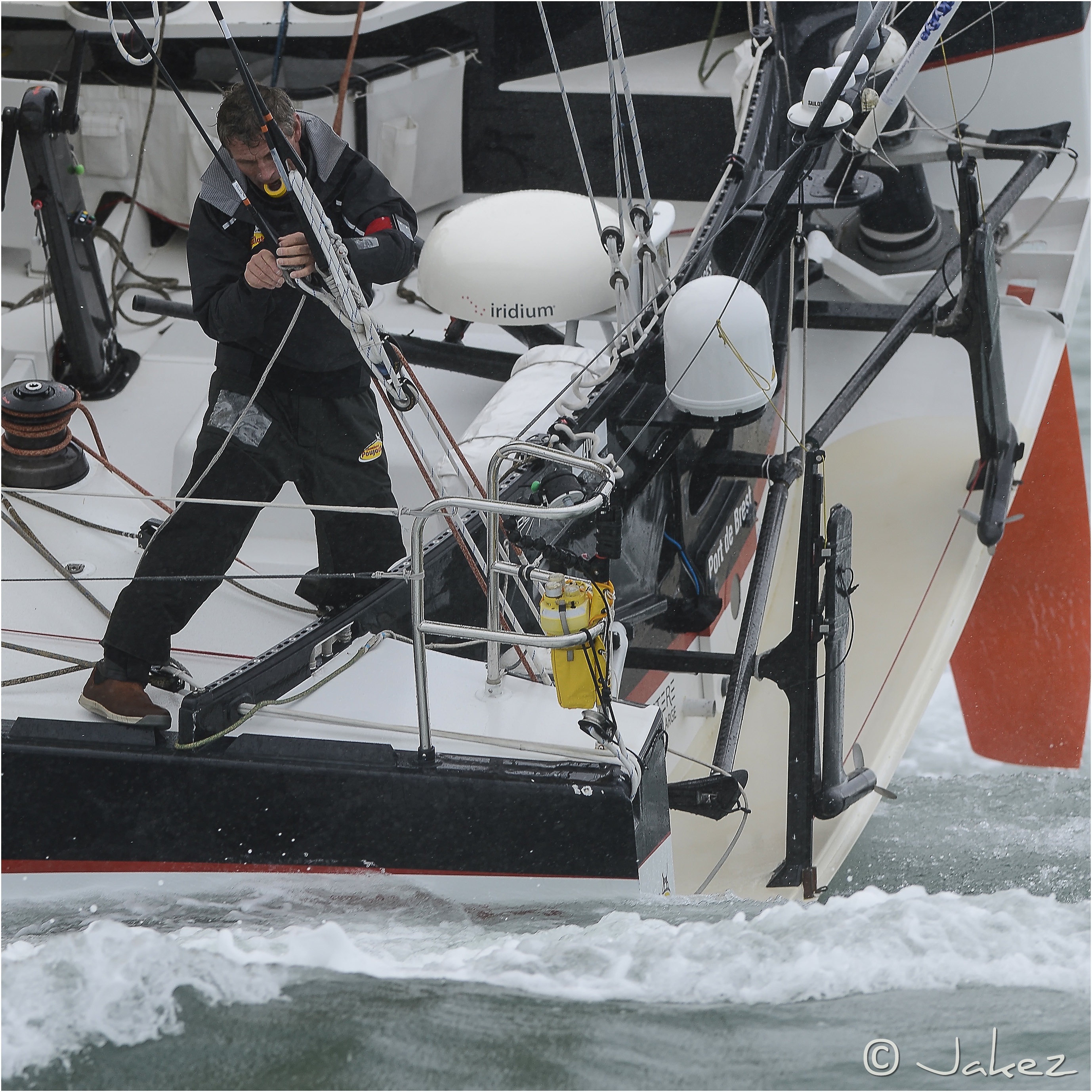 0649-Vendée 2012 (Départ)